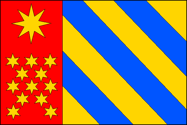 vlajka, Sudoměřice u Bechyně, okres Tábor